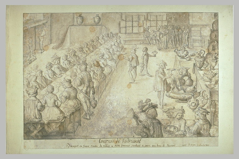 Jérôme Baullery ou Bollery (français, vers 1532-1598) : tournois de Sandricourt / Banquet ou furent traités de 1800 à 2000 hommes pendant 10 jours, que dura le tournois, en 1493, 16e siècle, dessin à la plume, encre brune, lavis brun, mine de plomb, rehauts de blanc, hauteur: 355 cm, largeur : 543 cm, Fonds des dessins et miniatures, INV23710, Musée du Louvre, Paris, France [1].